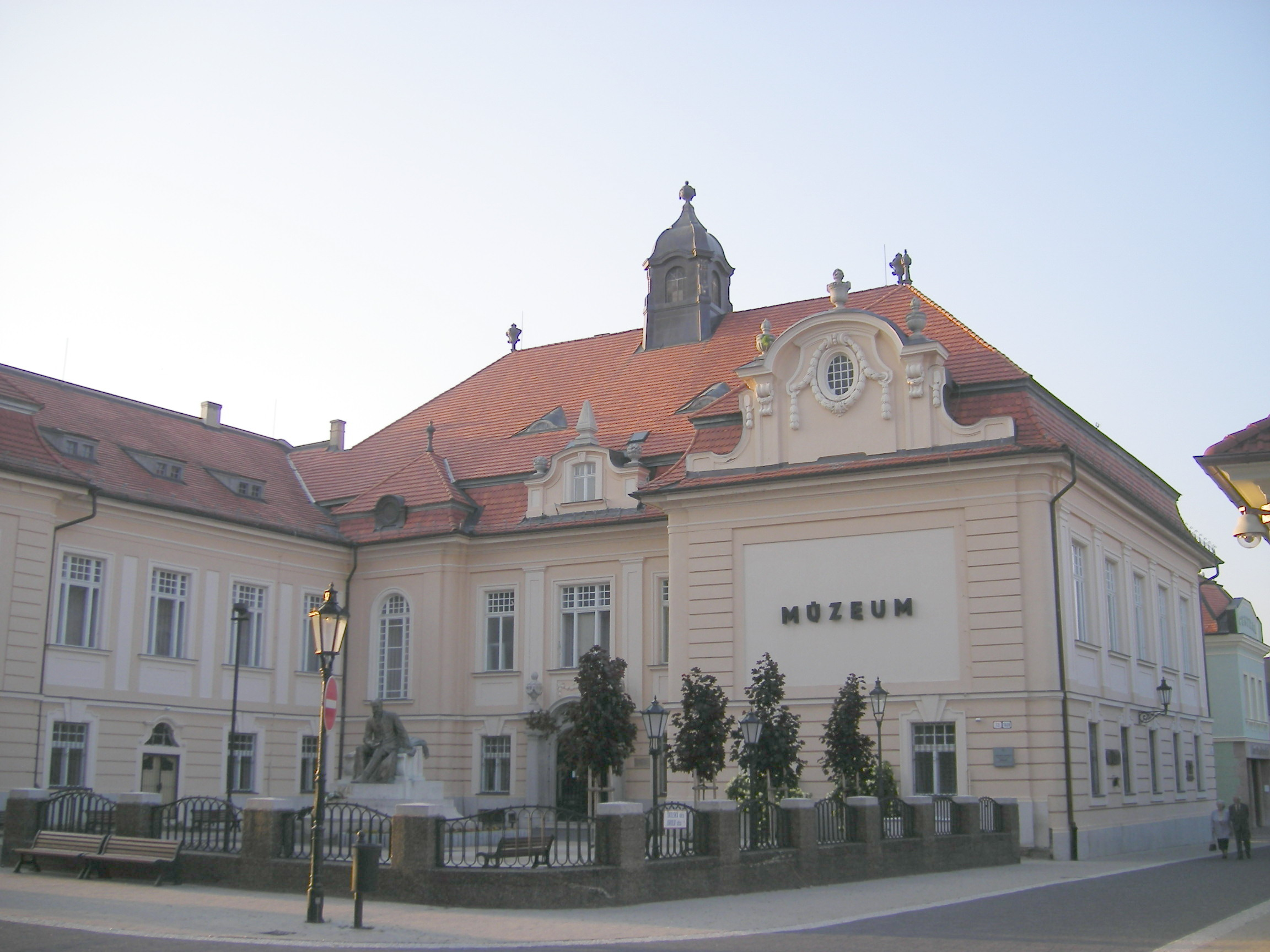 Komárom - Dunamenti-múzeum